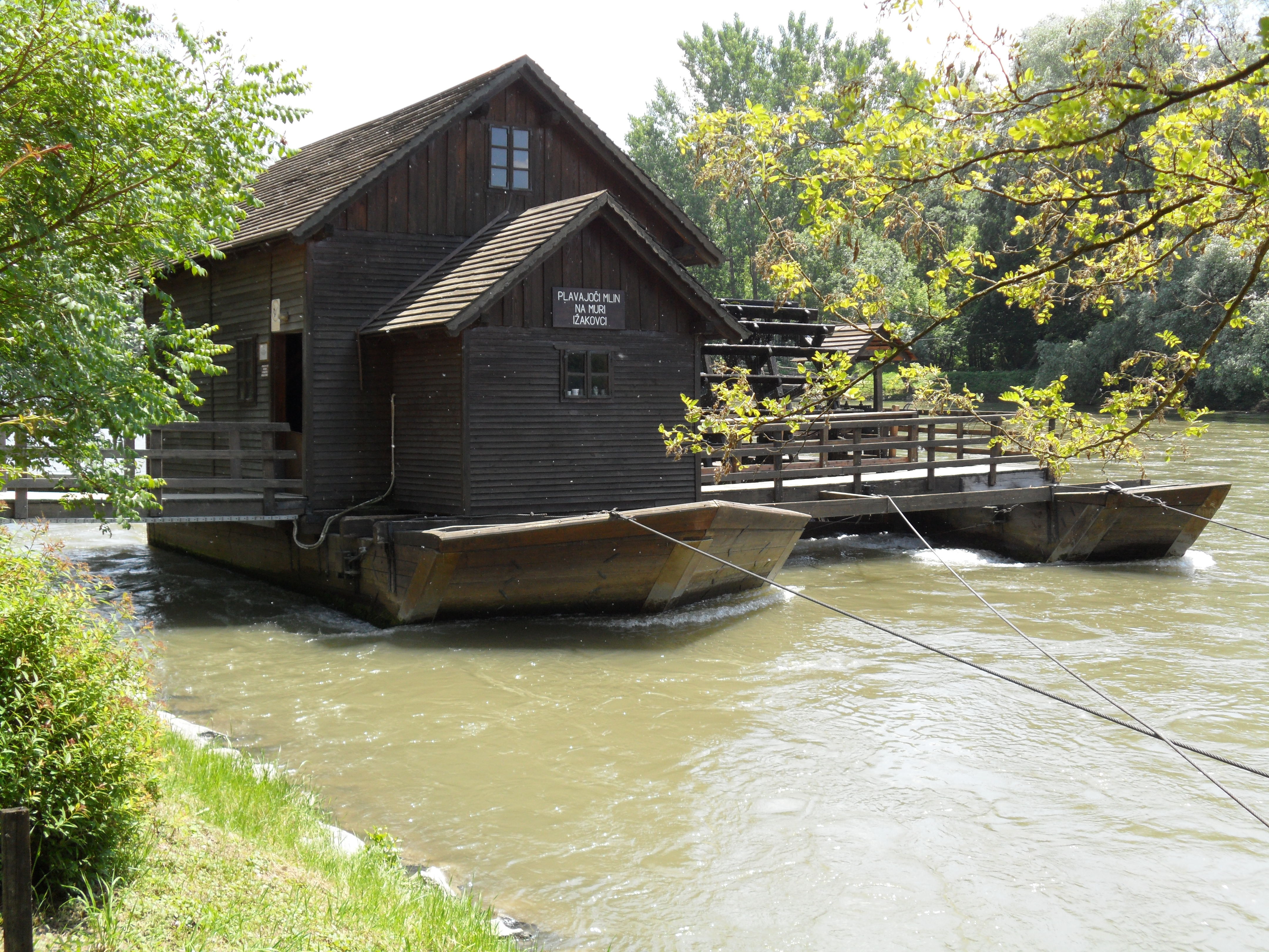 Ižakovci